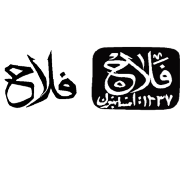 Felah Grubu Logosu